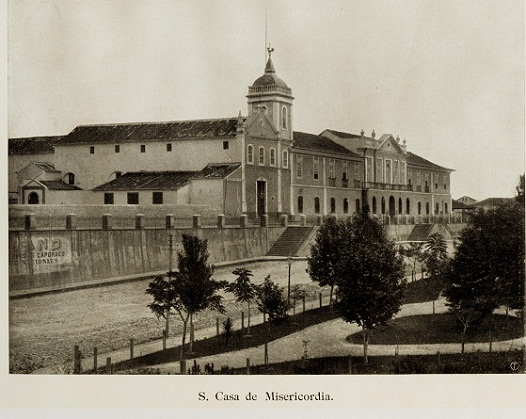 Santa Casa de Misericórdia